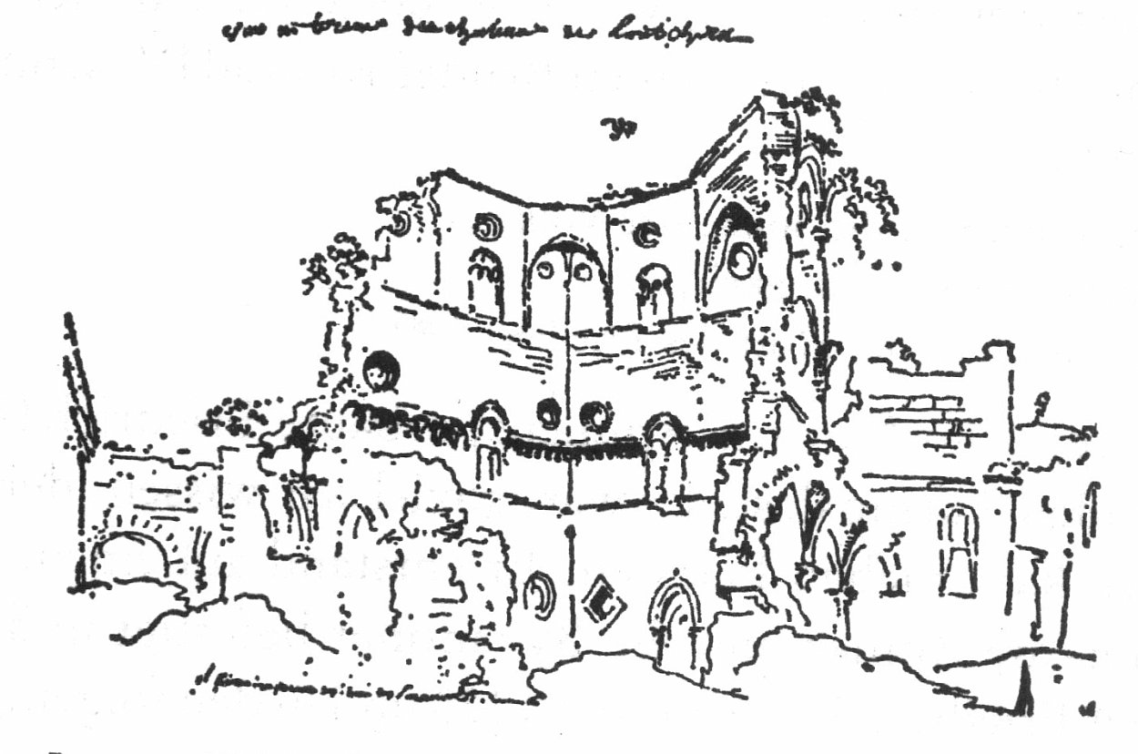 Lucera, Zeichnung der Ruine des staufischen Palastturmes